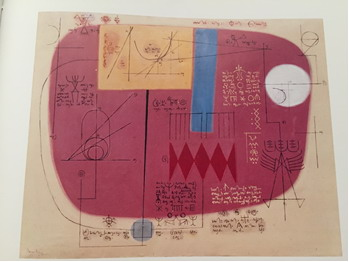 K.C.S. Paniker